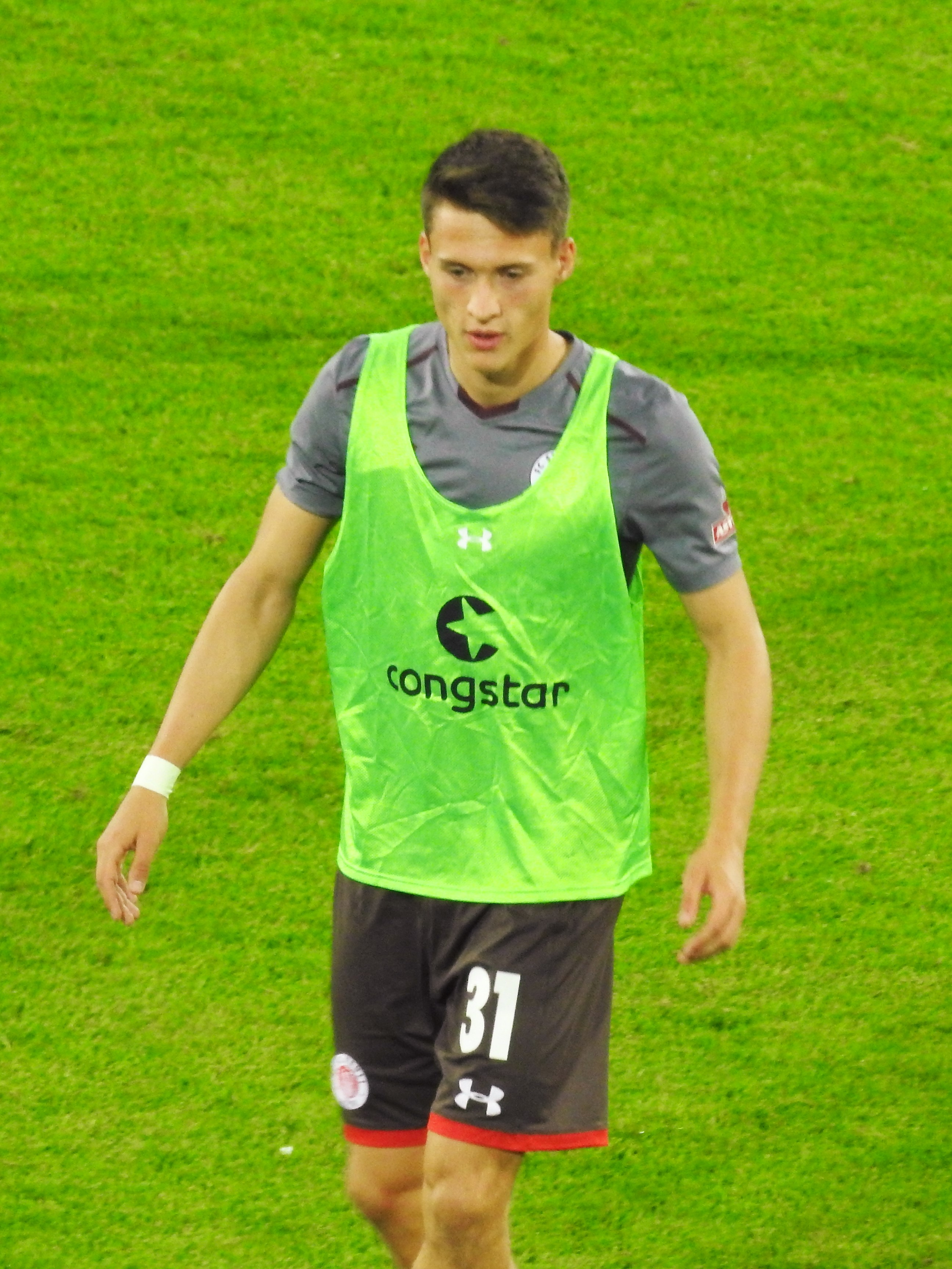 Maurice Litka FC St.Pauli